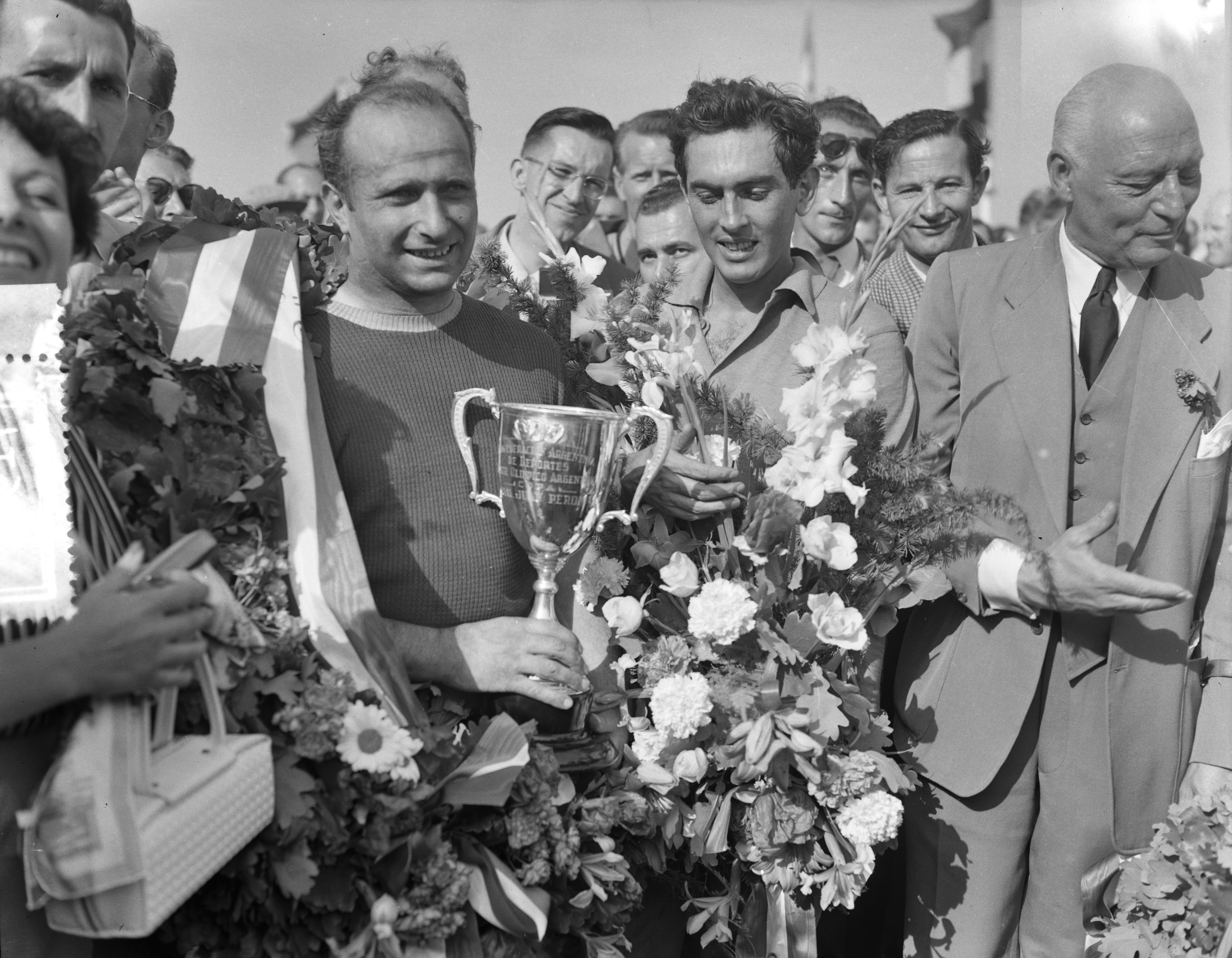 Collectie / Archief : Fotocollectie Anefo Reportage / Serie : [ onbekend ] Beschrijving : Grote Prijs van Nederland Zandvoort Datum : 19 juni 1955 Locatie : Noord-Holland, Zandvoort Persoonsnaam : Grote prijs van Nederland Fotograaf : Pot, Harry / Anefo Auteursrechthebbende : Nationaal Archief Materiaalsoort : Negatief (zwart/wit) Nummer archiefinventaris : bekijk toegang 2.24.01.04 Bestanddeelnummer : 907-1901